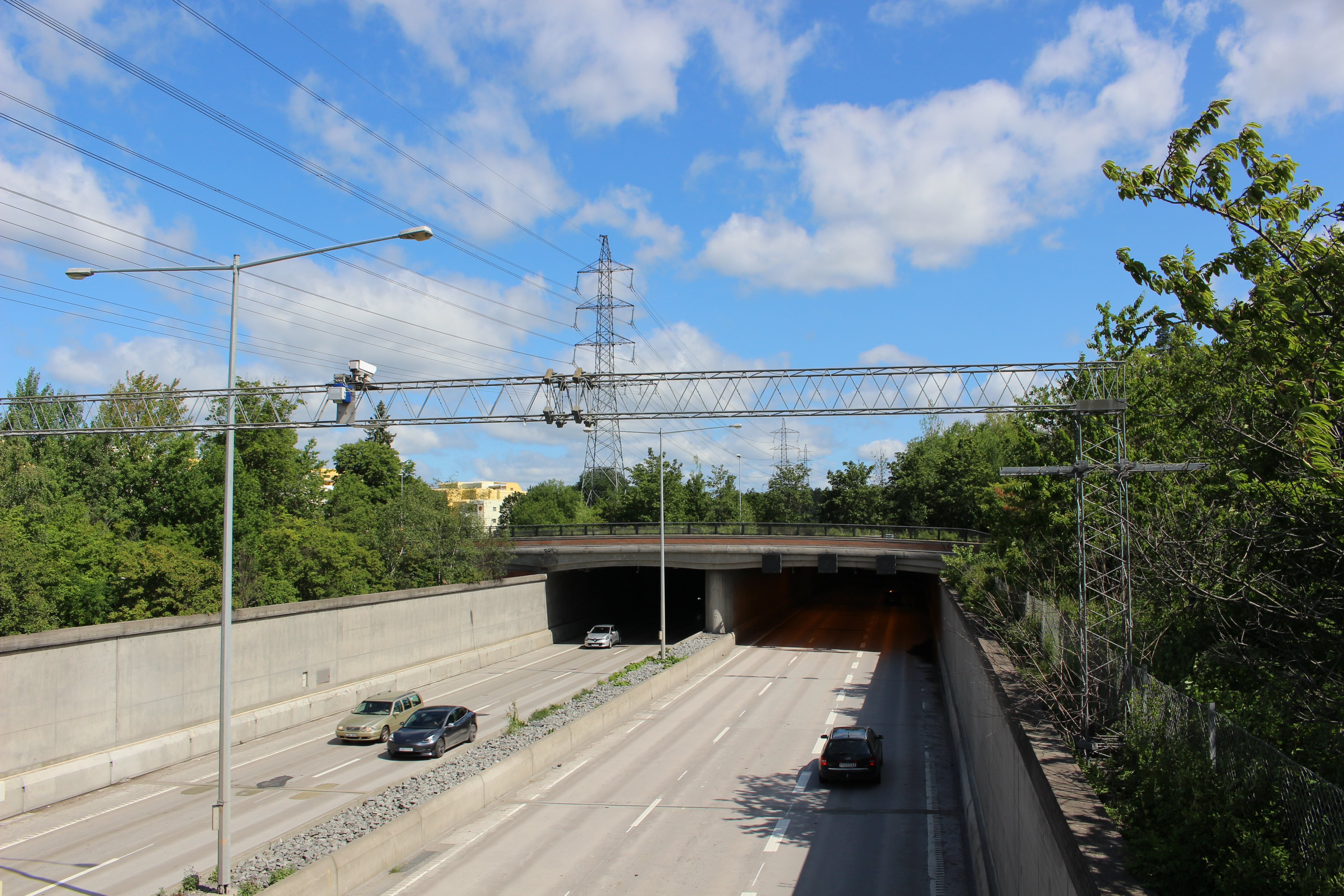 Häggvikstunnelns södra ingång.